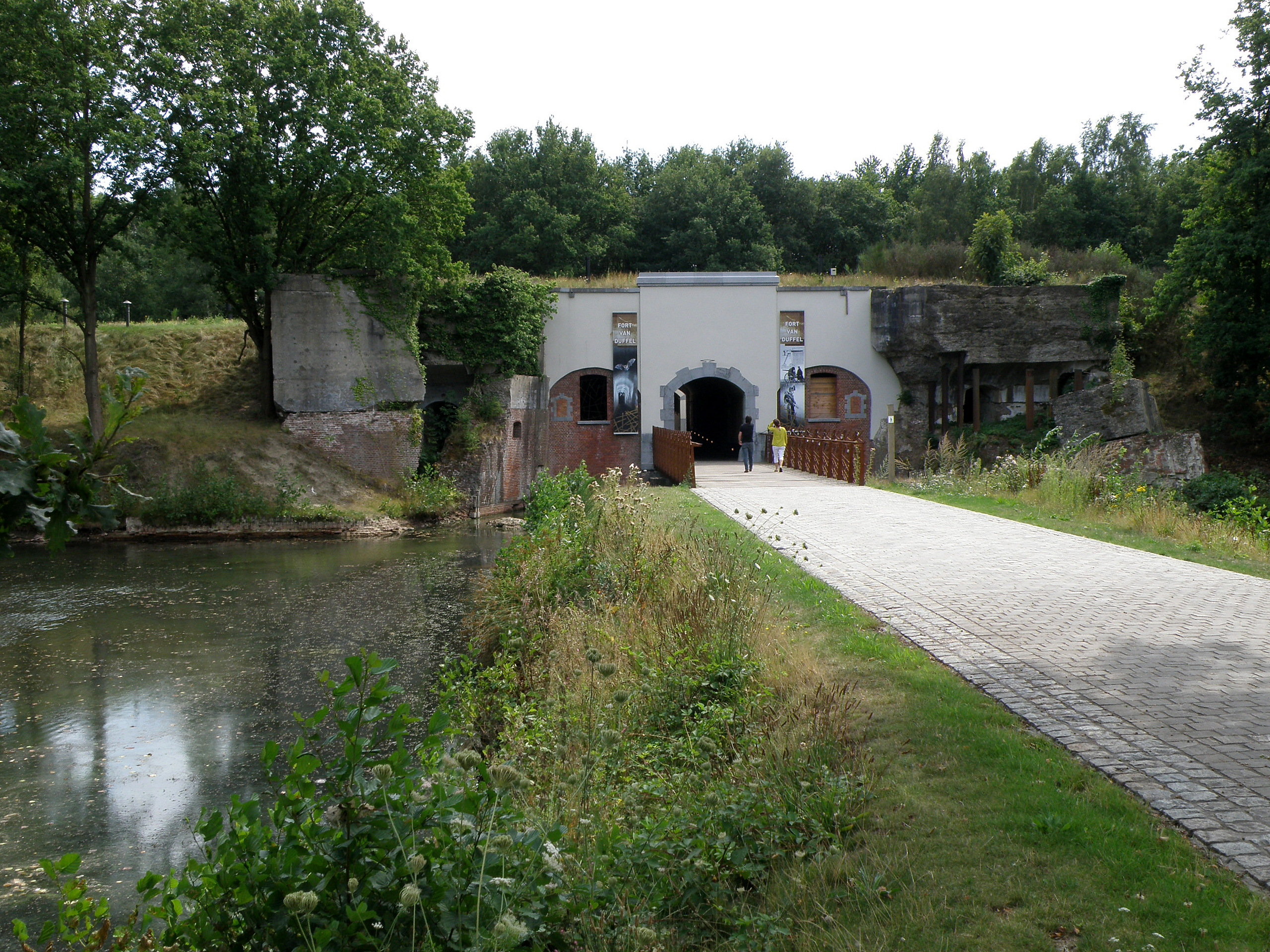 Duffel (prov. Antwerpen, België). Fort.